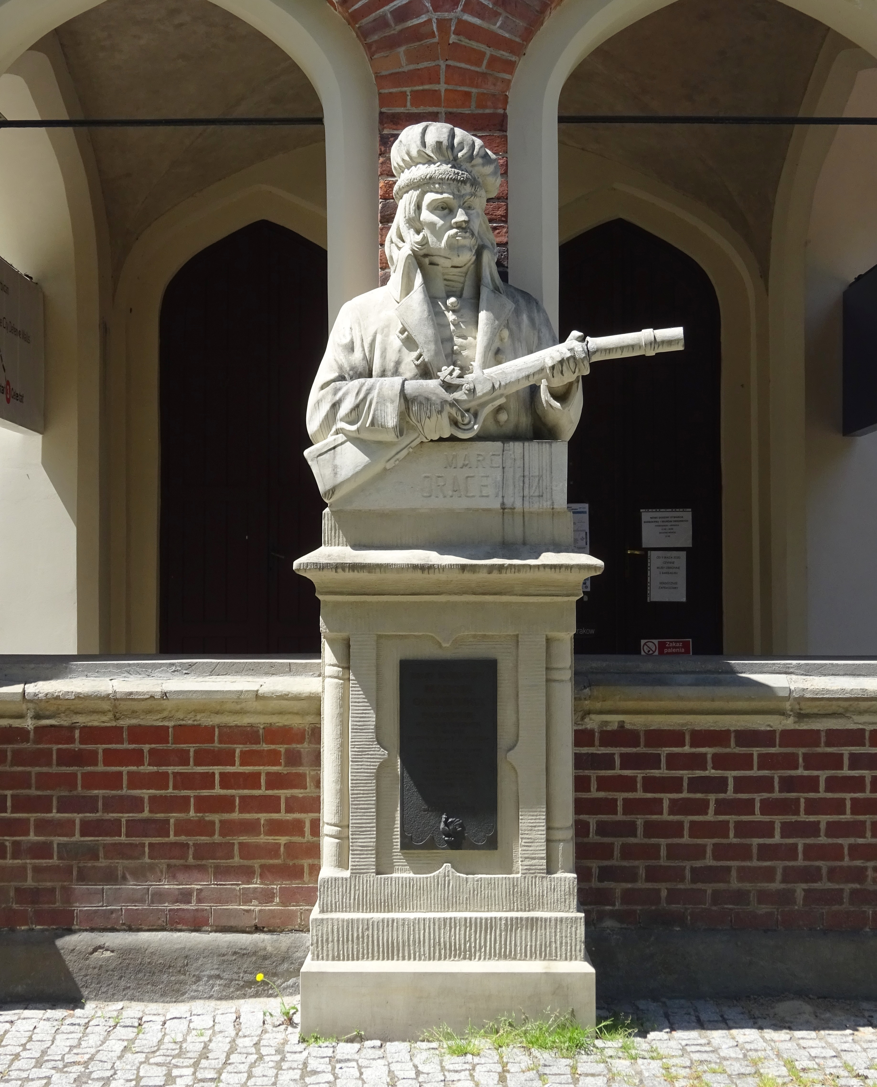 Pomnik Marcina Oracewicza autorstwa Michała Korpala z 1890 roku przy Celestacie w Parku Strzeleckim w Krakowie. 2020